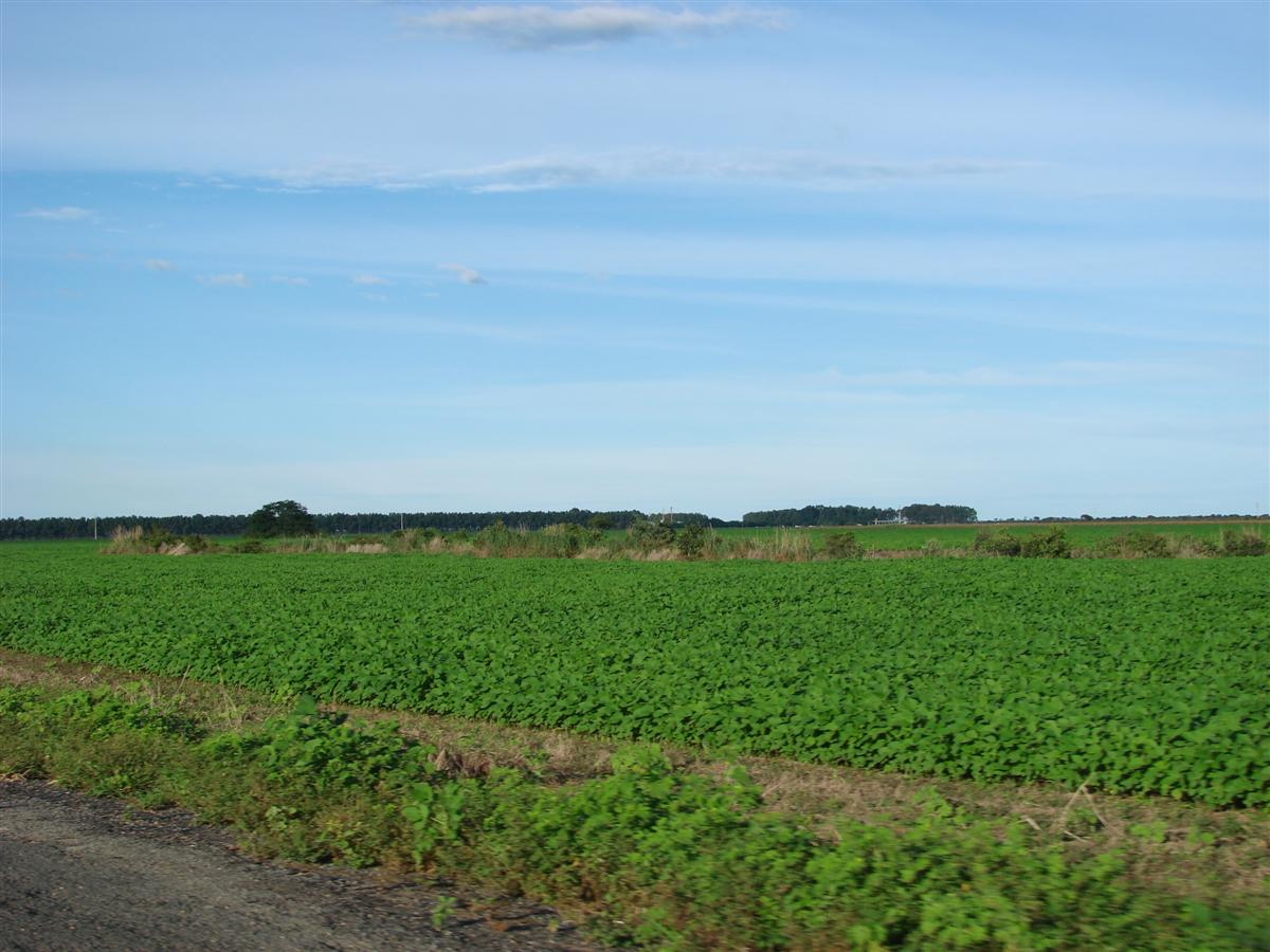 Sojicultura no interior da Bahia - área de expansão da fronteira agrícola